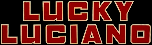 Lucky Luciano (Film) Logo